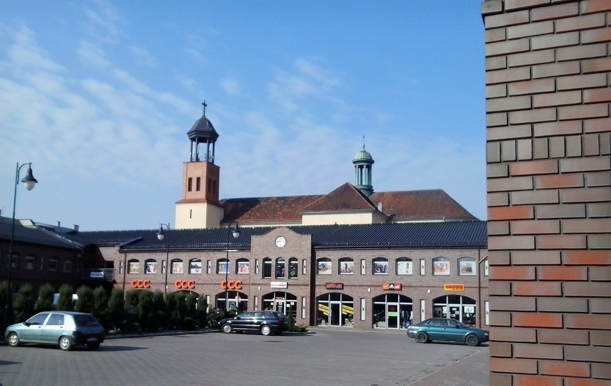 Galeria Jarocińska w centrum Jarocina.